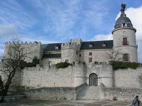 Castillo de Simancas Foto propia, vista del castillo de simancas (Valladolid)